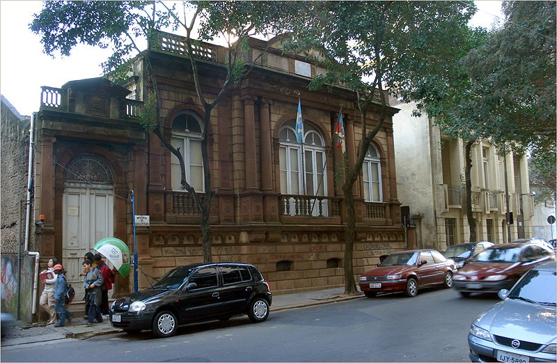 Museu Julio de Castilhos, Porto Alegre, Brasil.